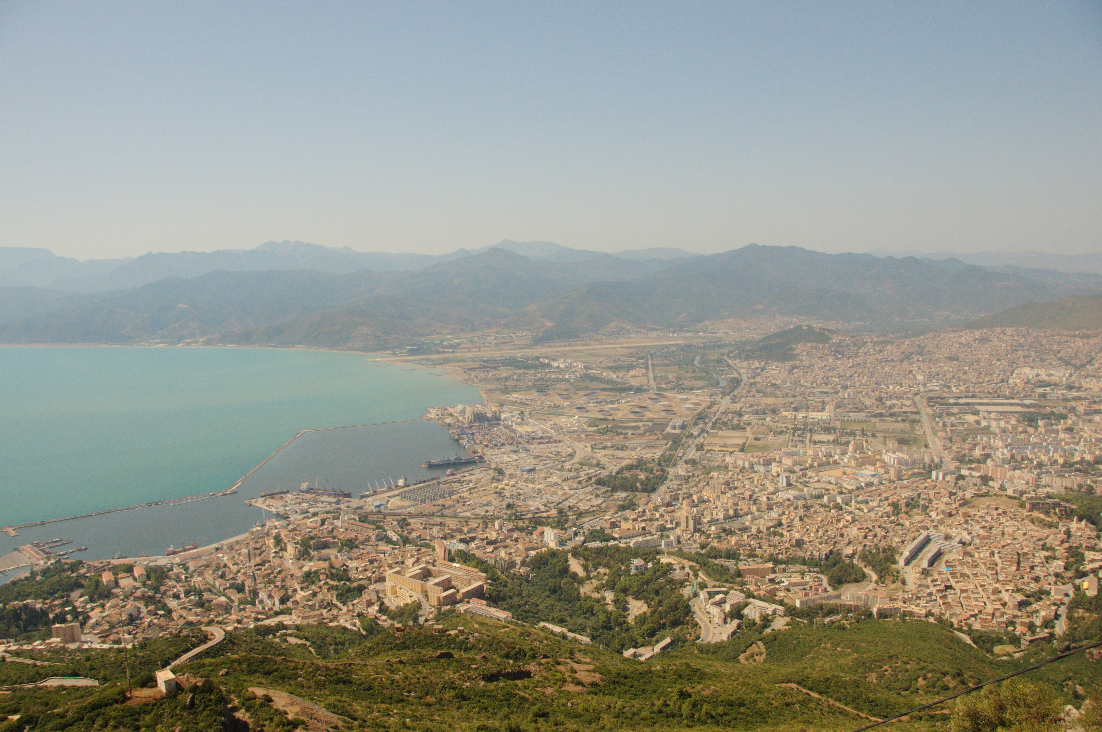 Vue de Béjaïa depuis Yemma Gouraya